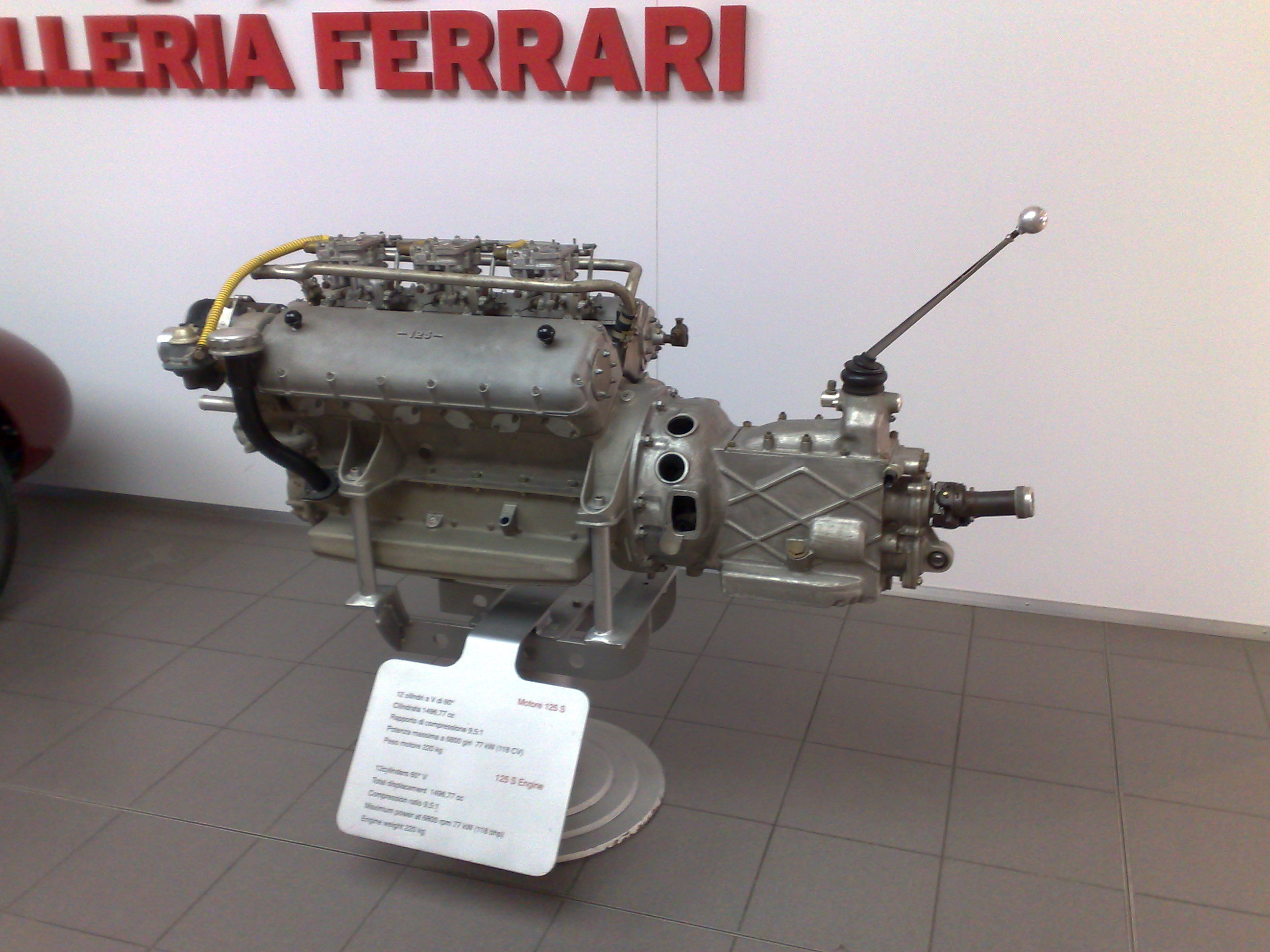 Motore di una Ferrai 125 S esposto alla Galleria Ferrai di Maranello